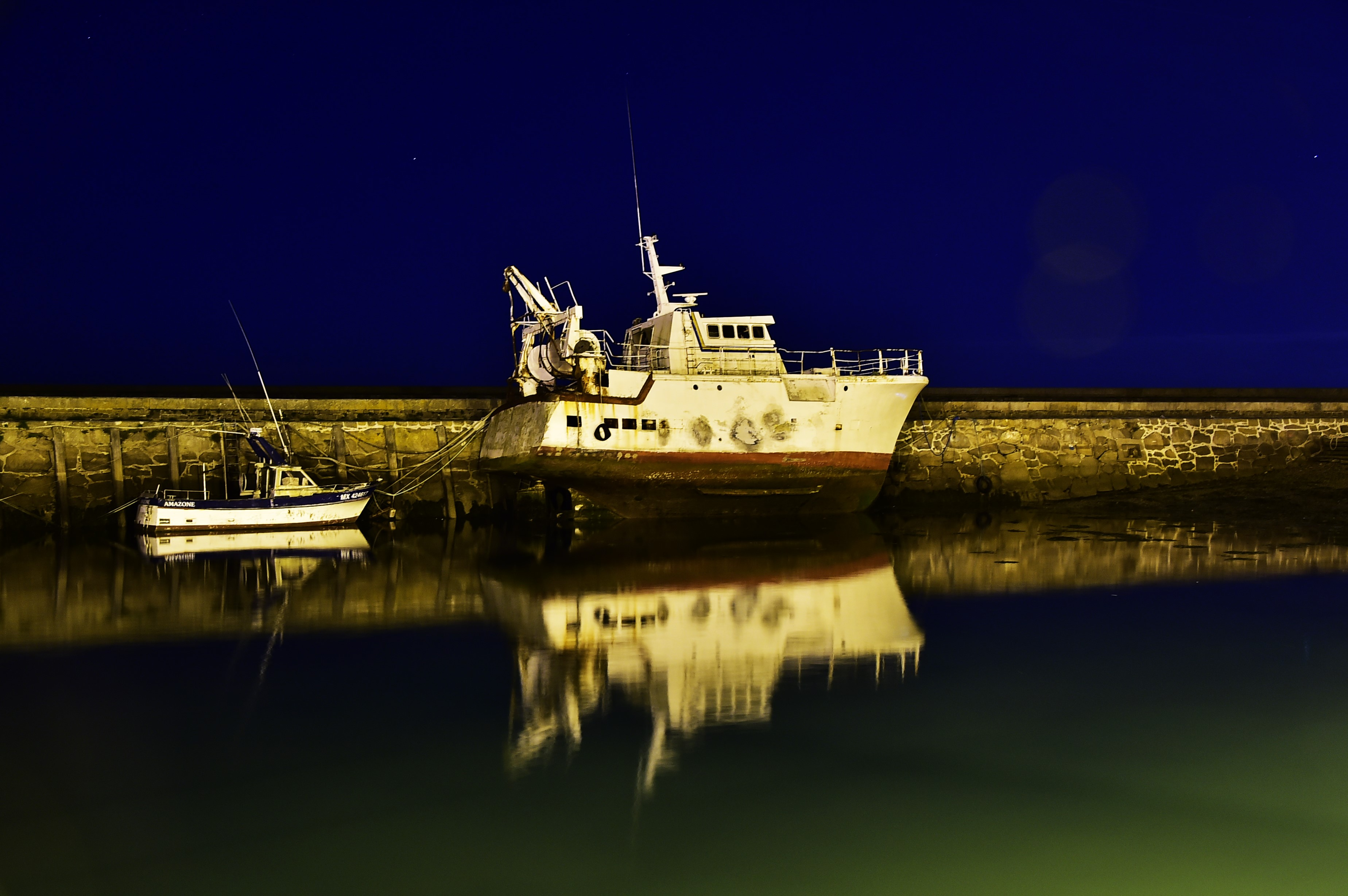 Saint-Vaast-la-Hougue, Normandie